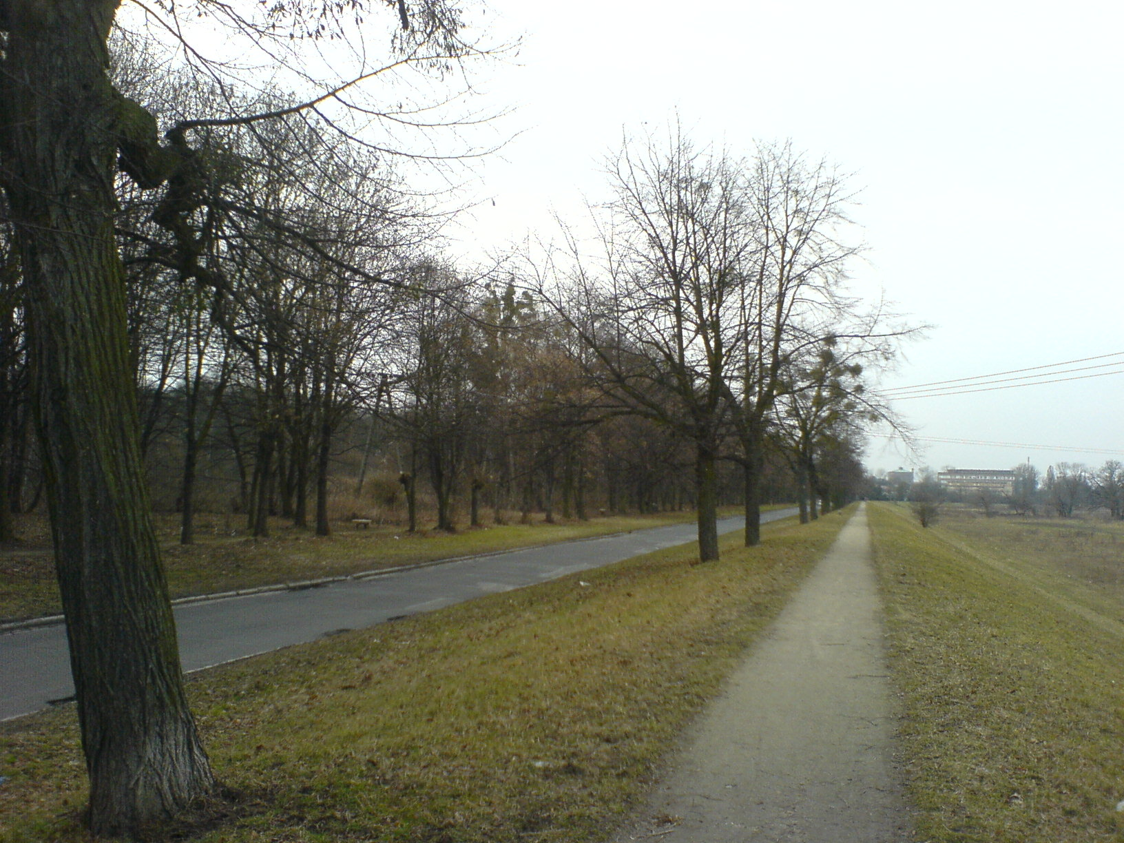 Wrocław, ulica Międzyrzecka, Las Rakowiecki